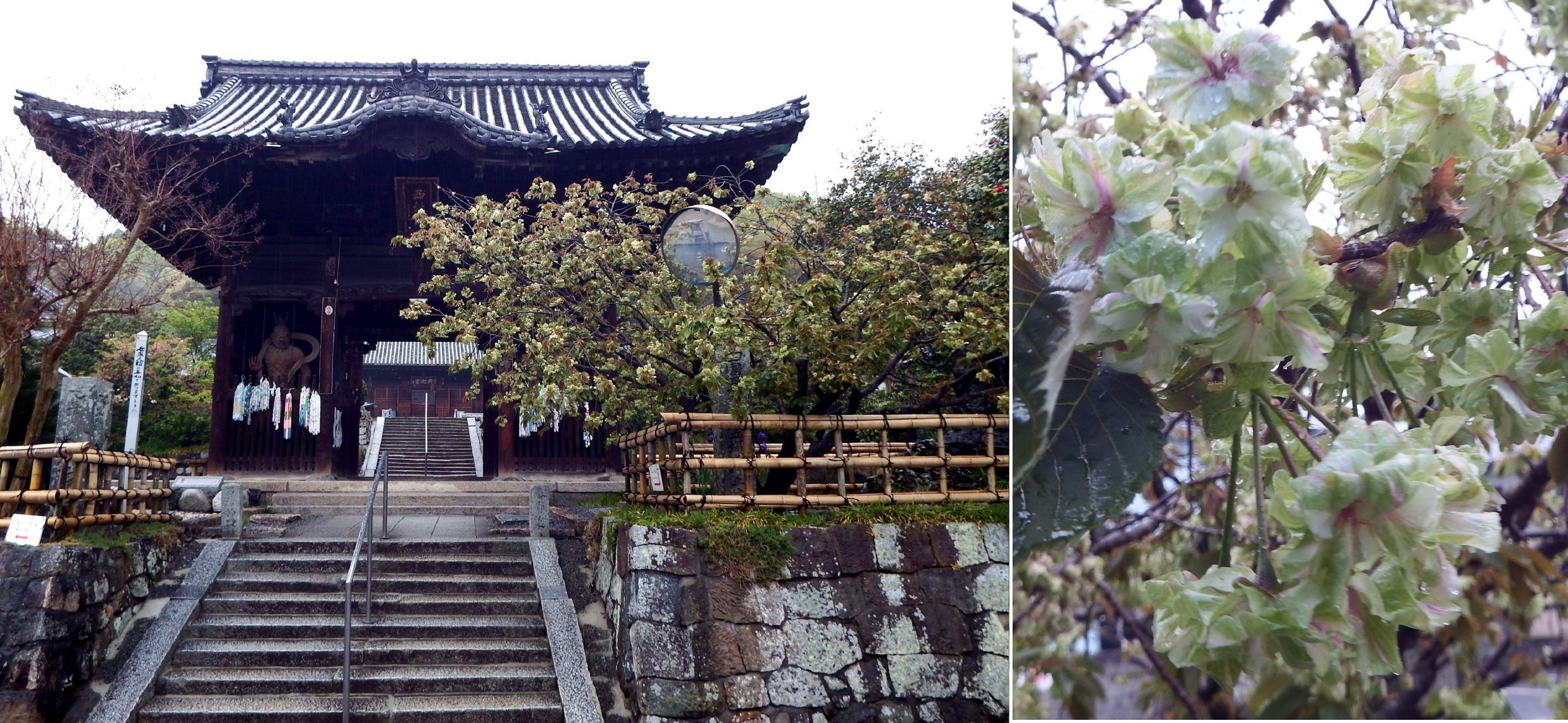 浄土寺の山門脇に咲く御衣黄桜